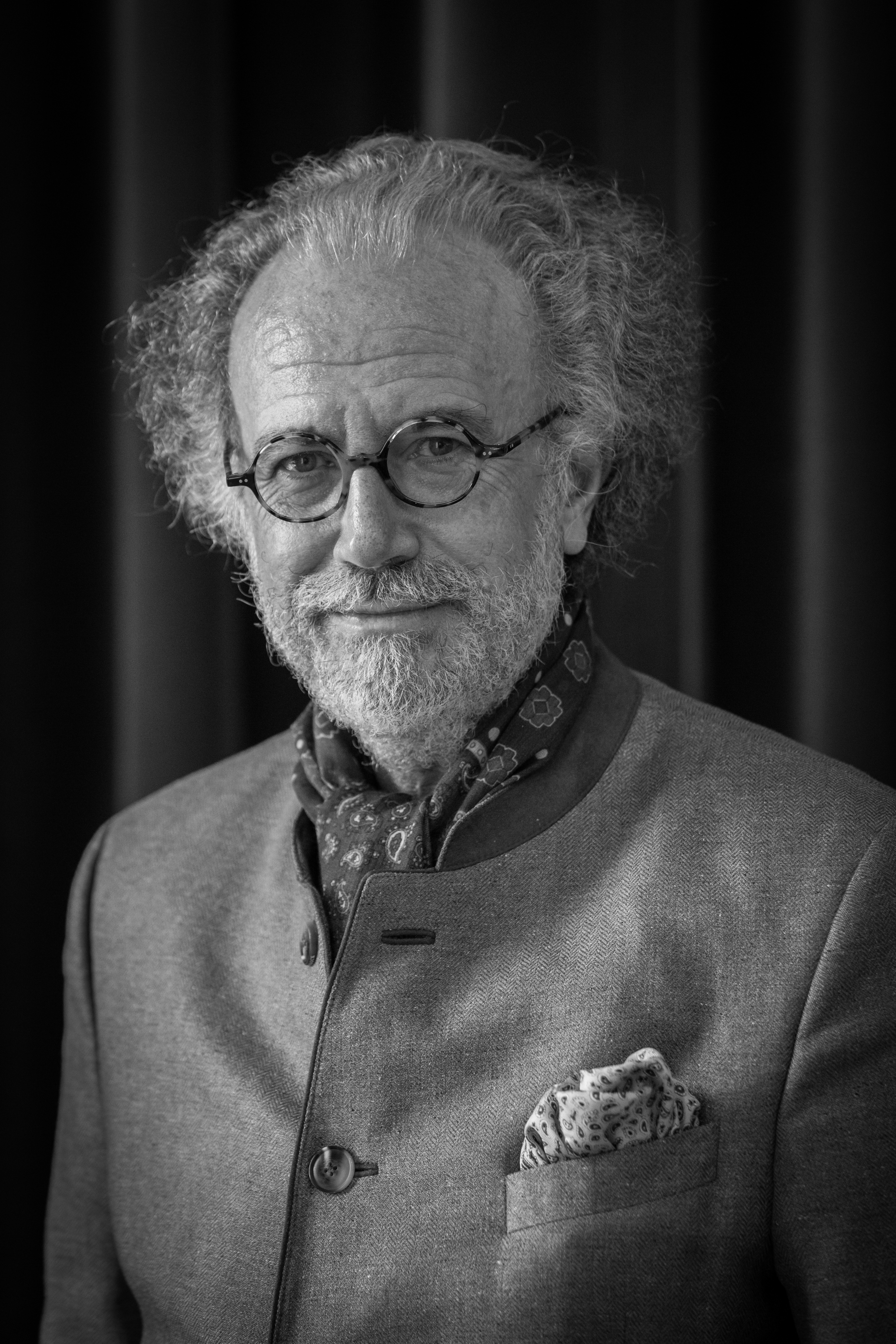 Amaury du Closel par Claude Truong-Ngoc septembre 2015